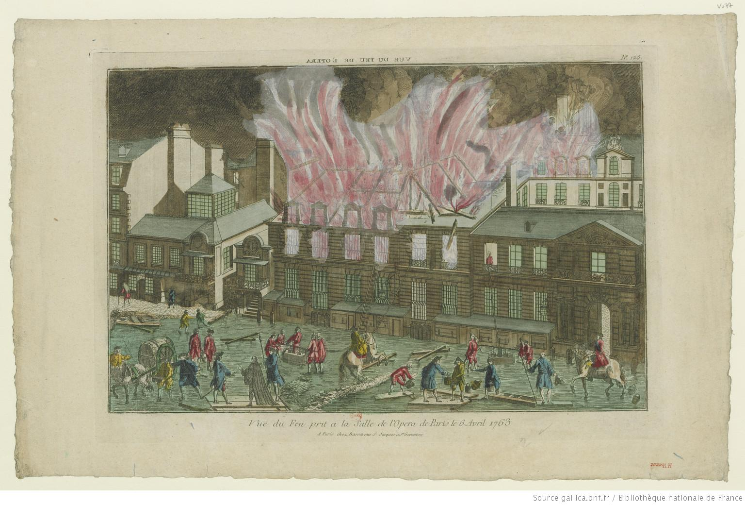 André Basset, éditeur et marchand d'estampes, (17..-178.), Henry Émile Vivarez, (18..-1915?). Collectionneur.- Vue du feu prit a la salle de l'Opera de Paris le 6 avril 1763. N° 125, A Paris chez Basset rue St Jacques a Ste Geneviève, ca 1763. BnF, Est. LI-72 (1)- FOL.